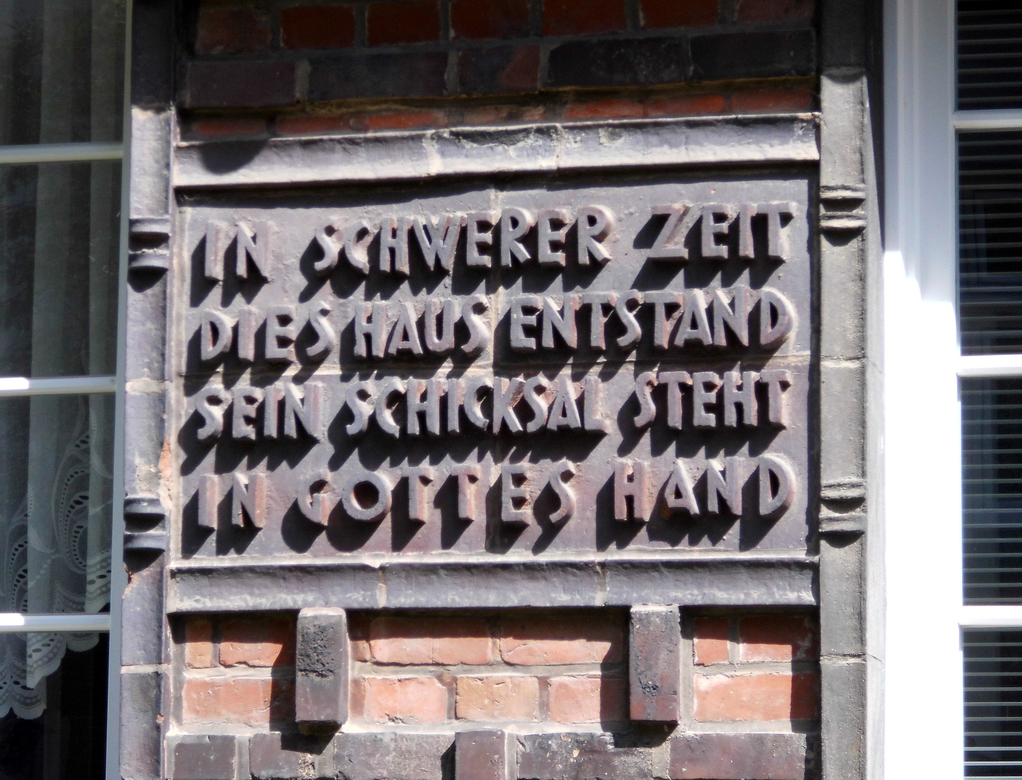 Hardenbergstraße 36, Kiel, Fassadendetail. Siehe auch Gesamtaufnahme des Hauses